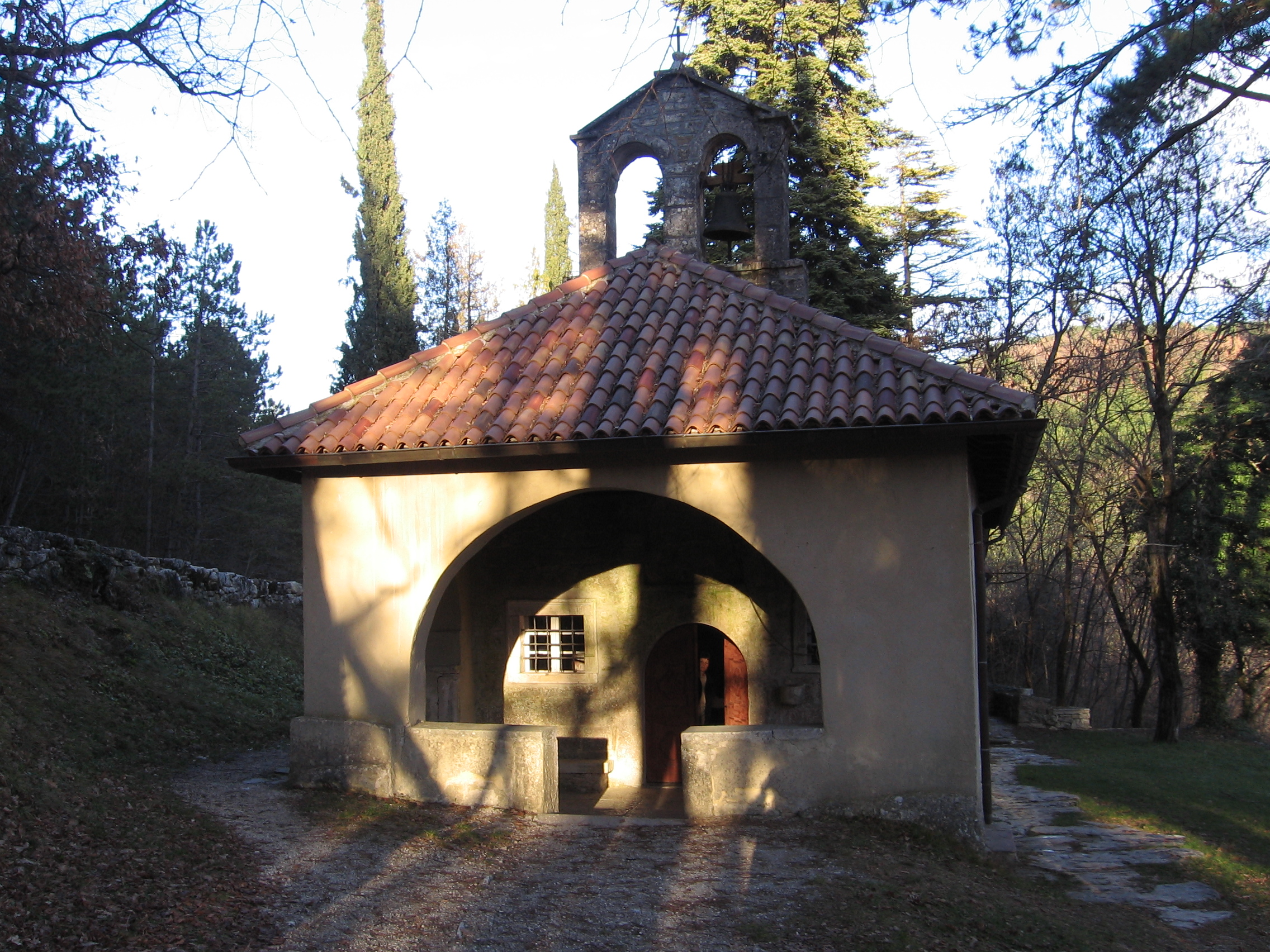 Crkva Beram